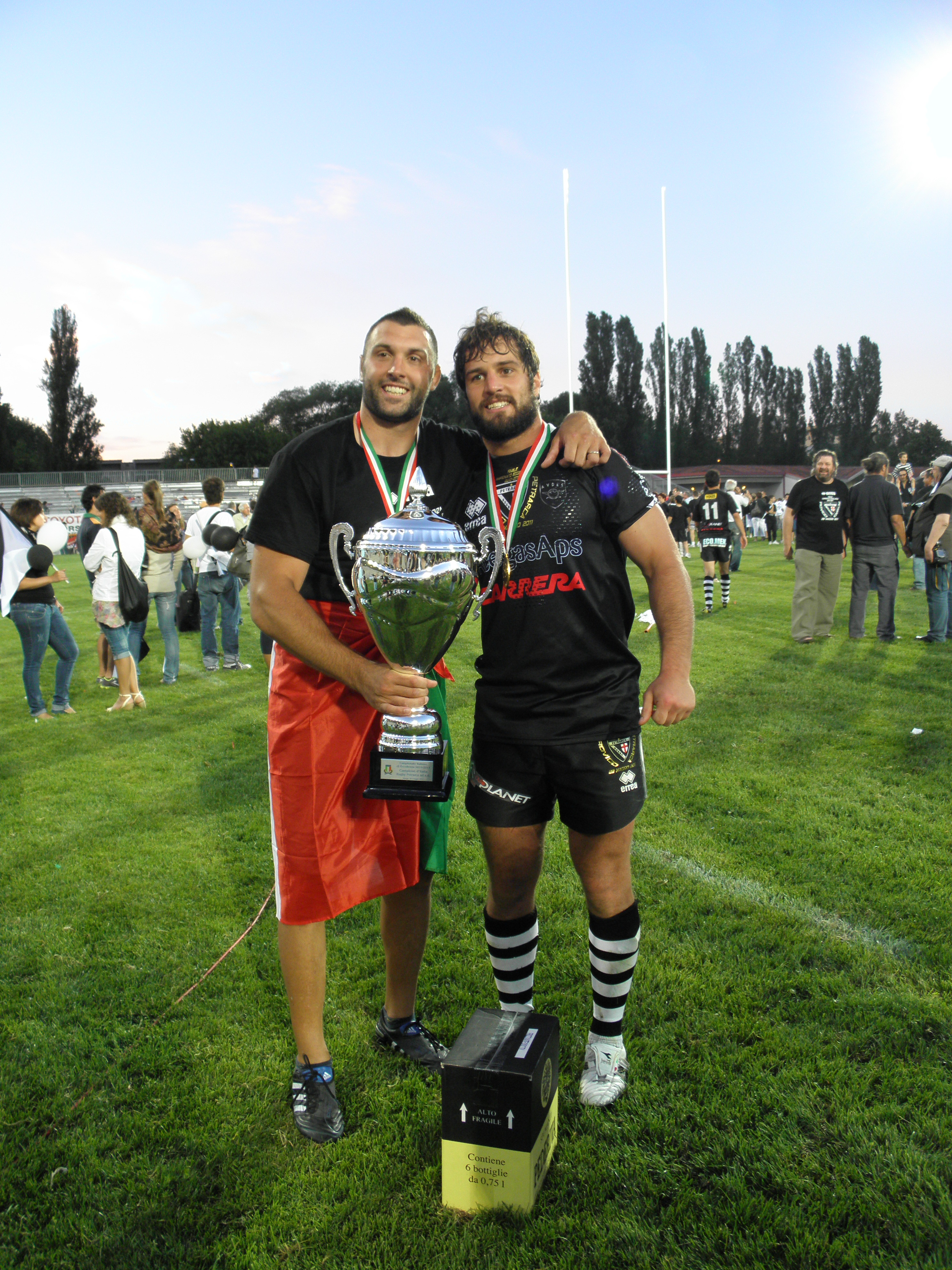 Rovigo, 28 maggio 2011: Campionato di Eccellenza di rugby a 15 2010-2011. I giocatori del Petrarca Padova in posa con la coppa appena conquistata.